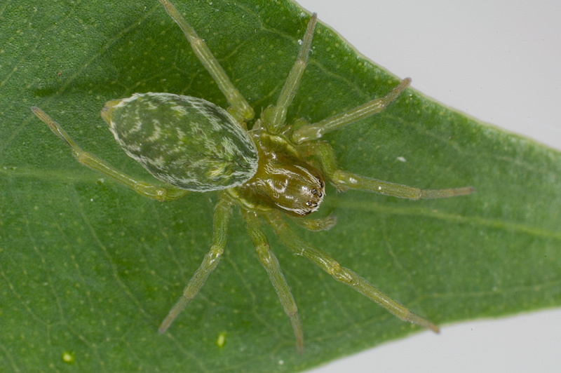 Nigma walckenaeri